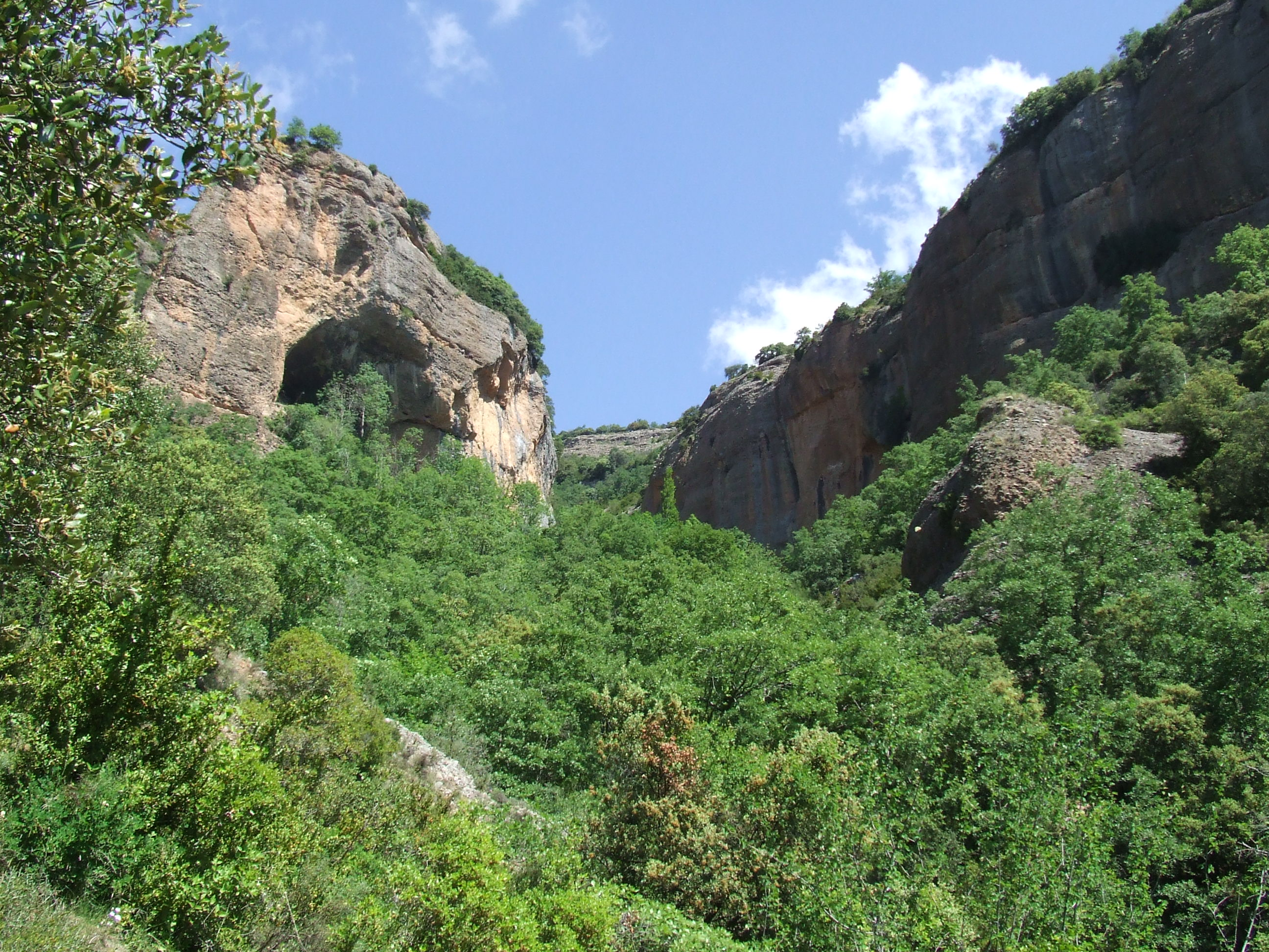 Llau d'Espluguell (Serradell, Toralla i Serradell, Conca de Dalt, Pallars Jussà)